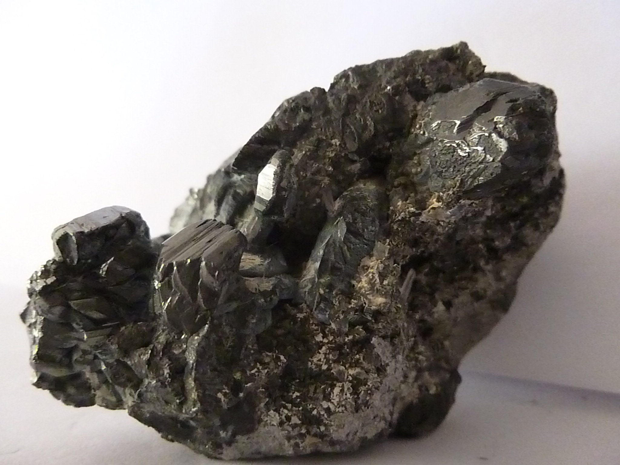 Mineral de Casiterita procedente de la Mina Telamayu, Bolivia